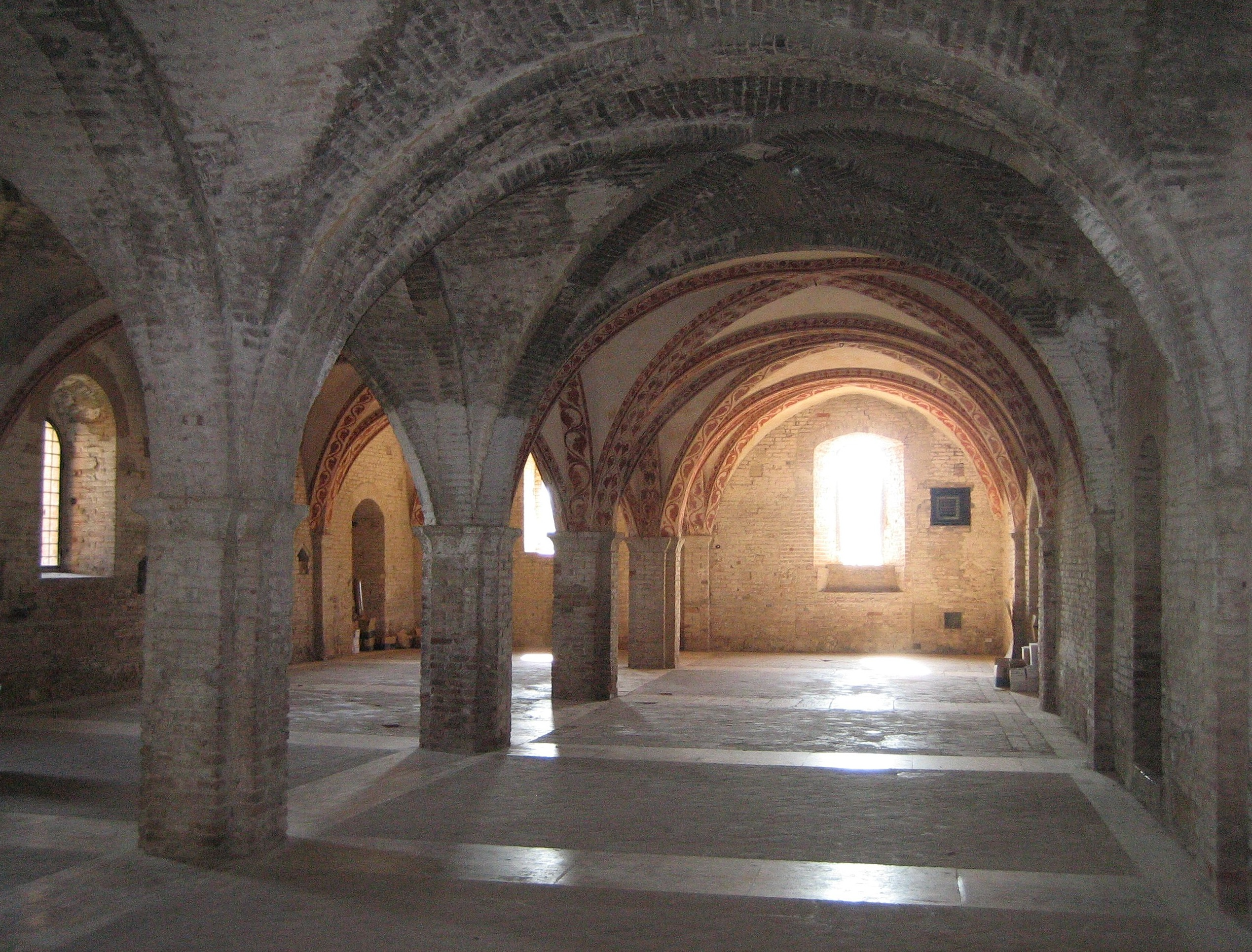 Kapitelsaal von San Galgano